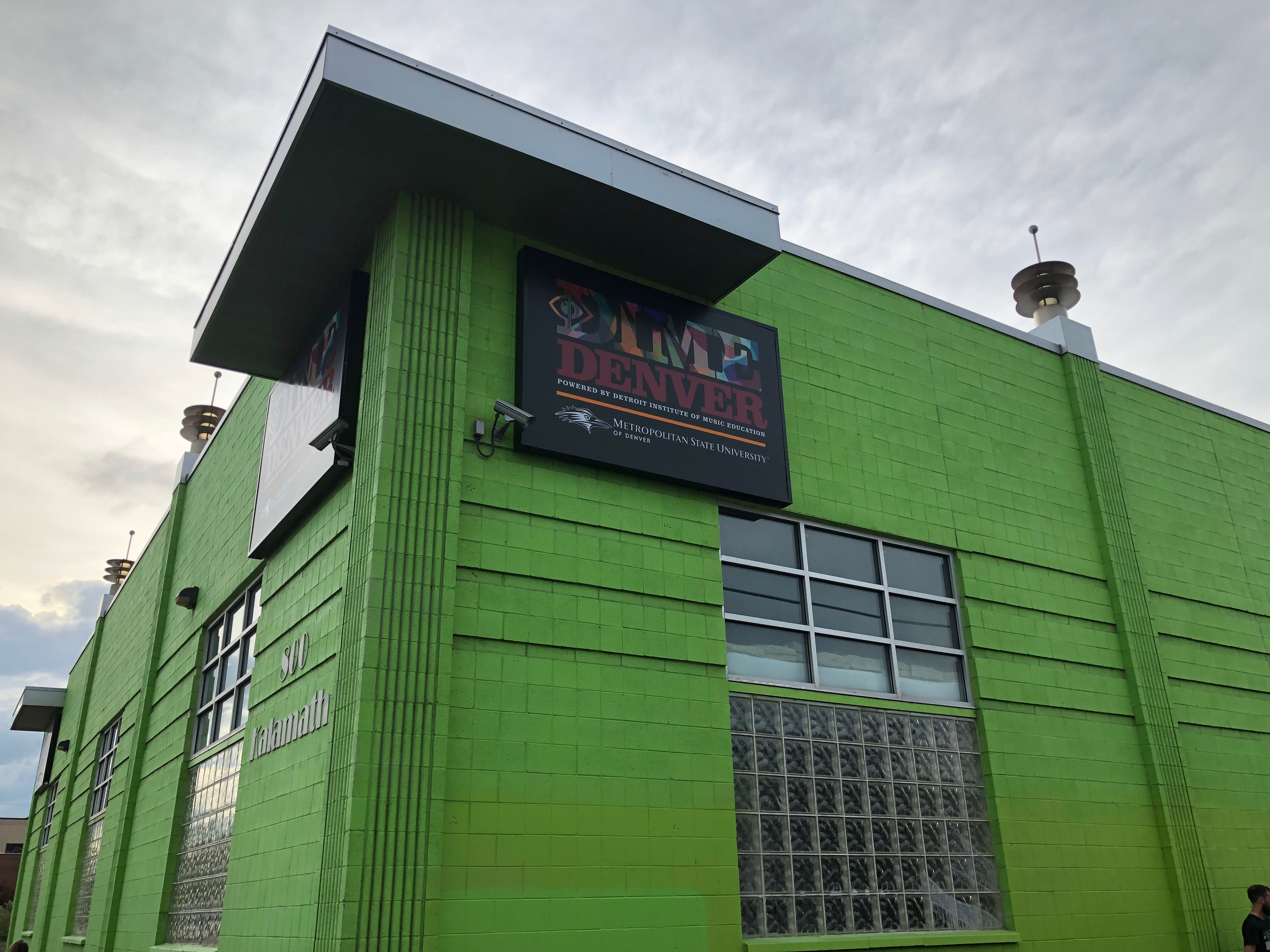 DIME Denver